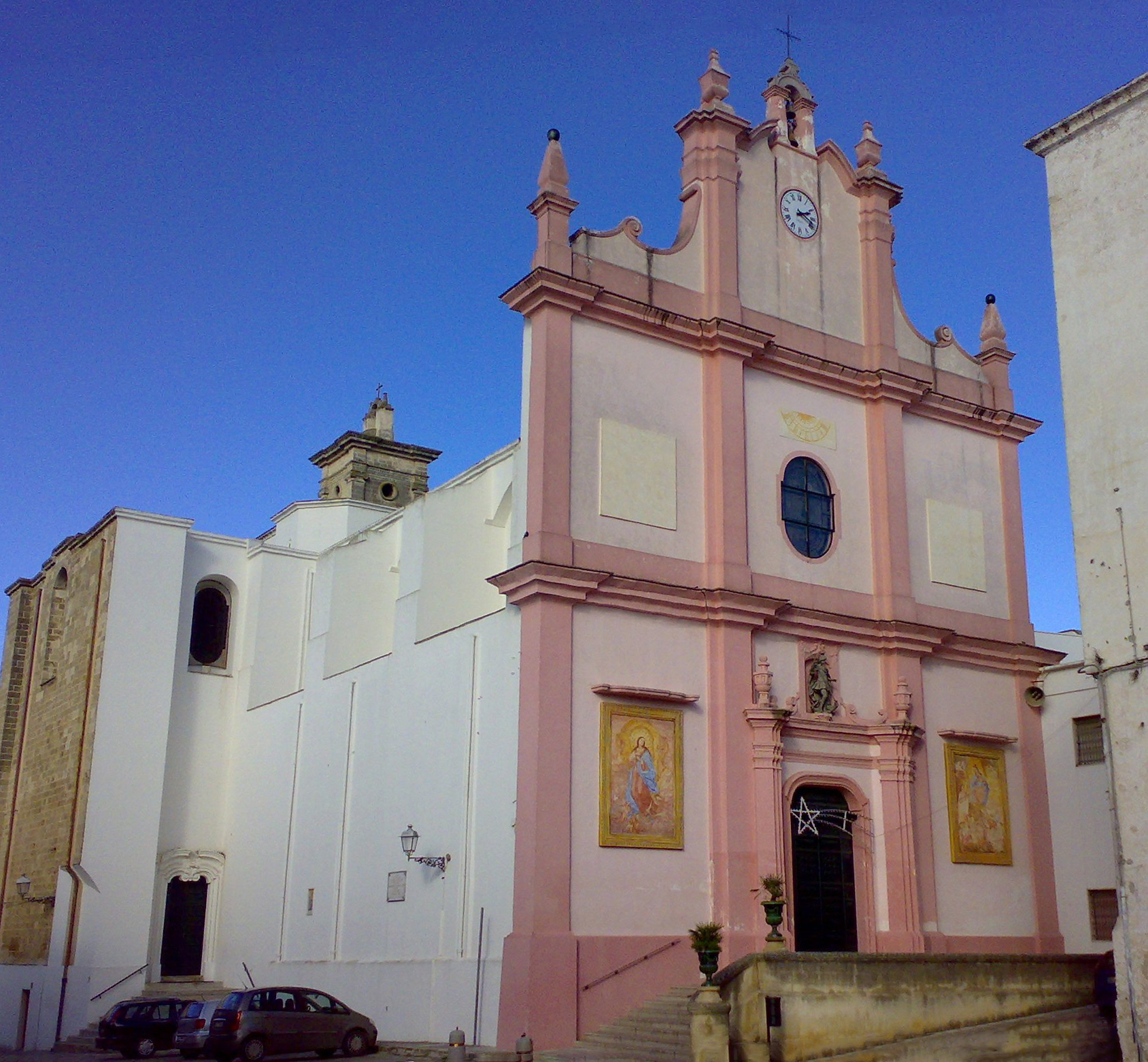 Chiesa di San Giorgio Matino, provincia di Lecce